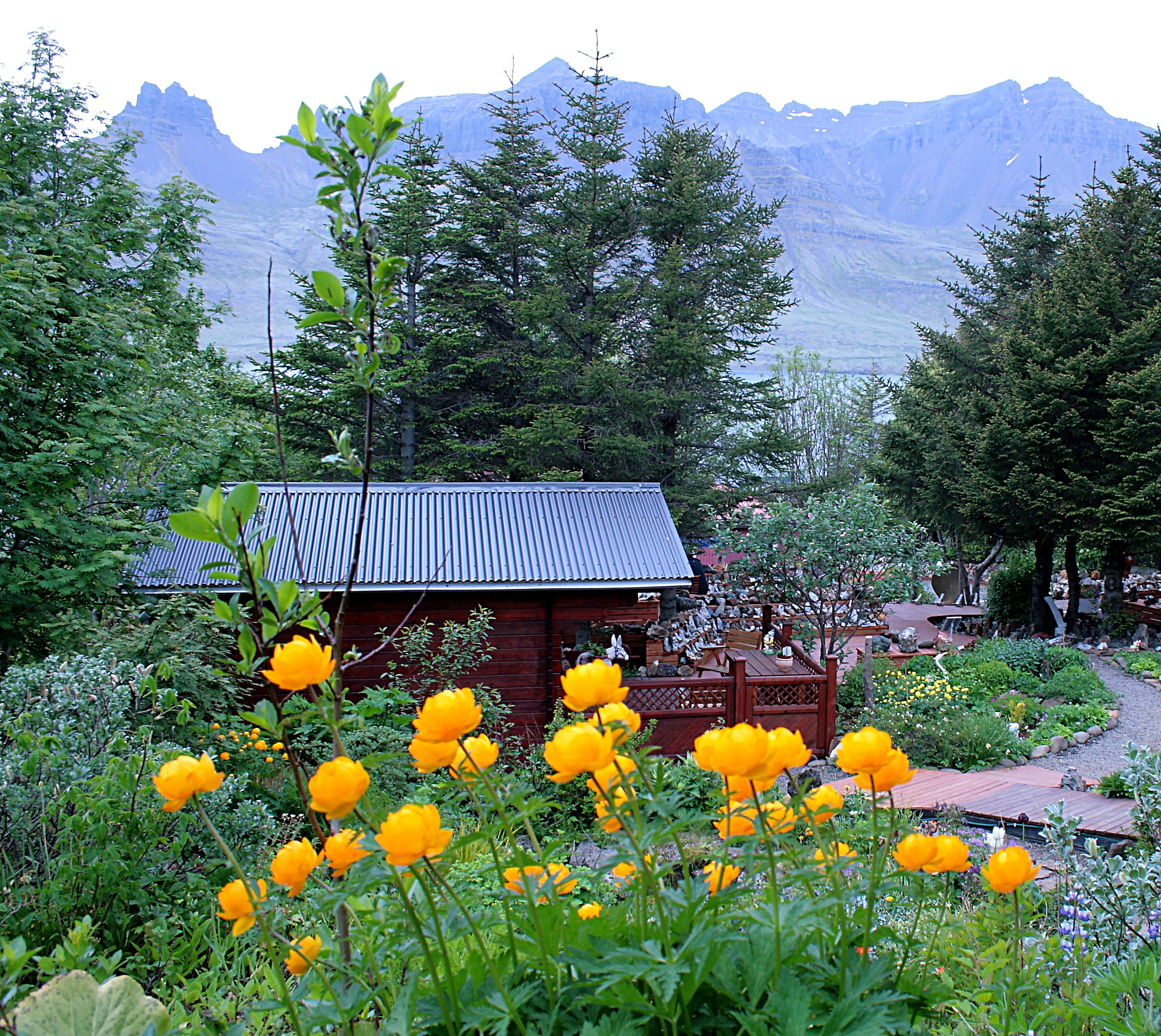 Stöðvarfjörður: Steinemuseum Petra Sveinsdóttir